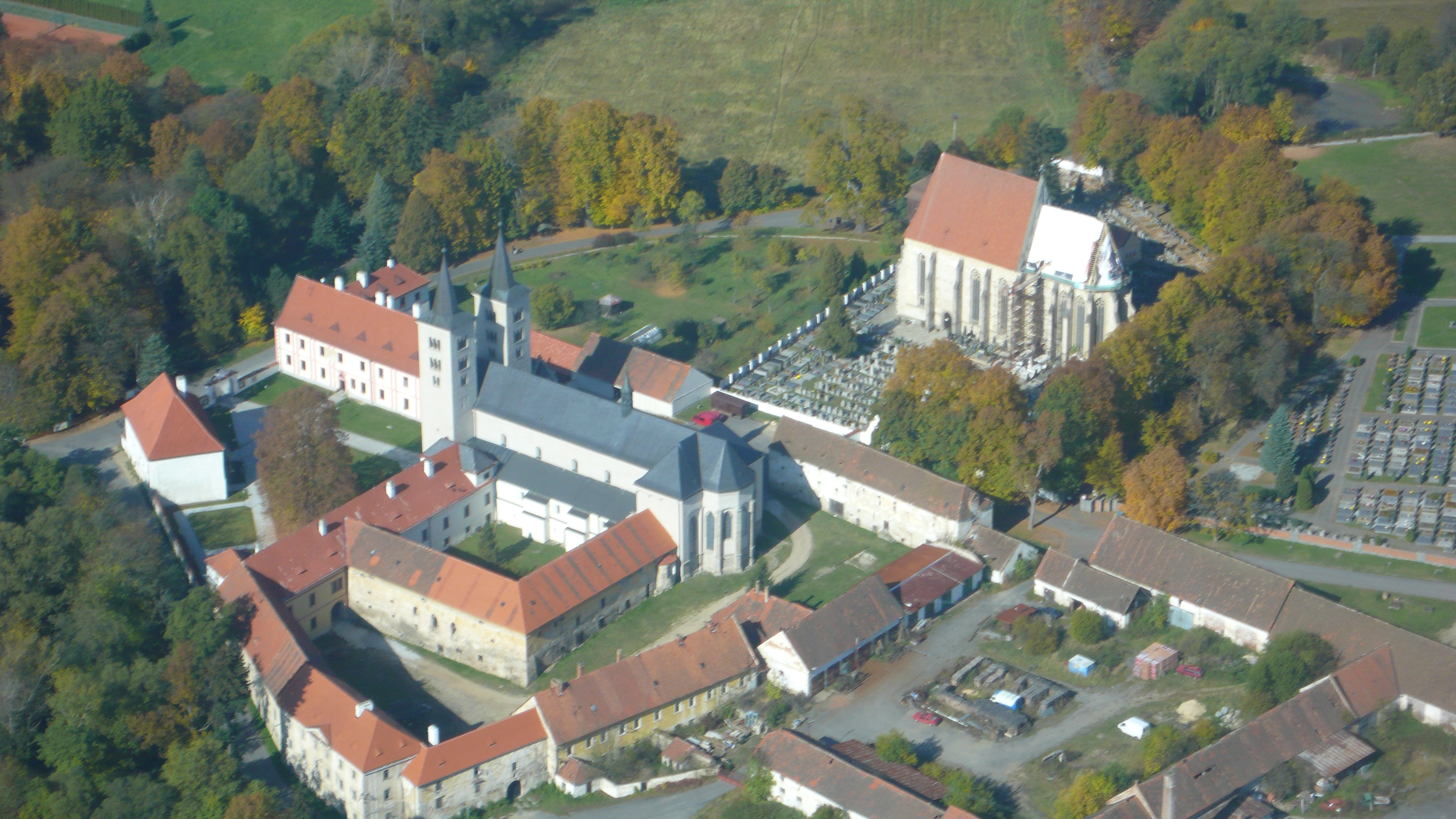 Česky: Kostely v Milevsku